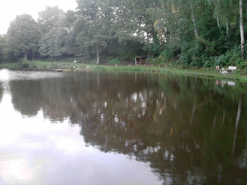 Forellensee-Holm gesamtübersicht des Sees.